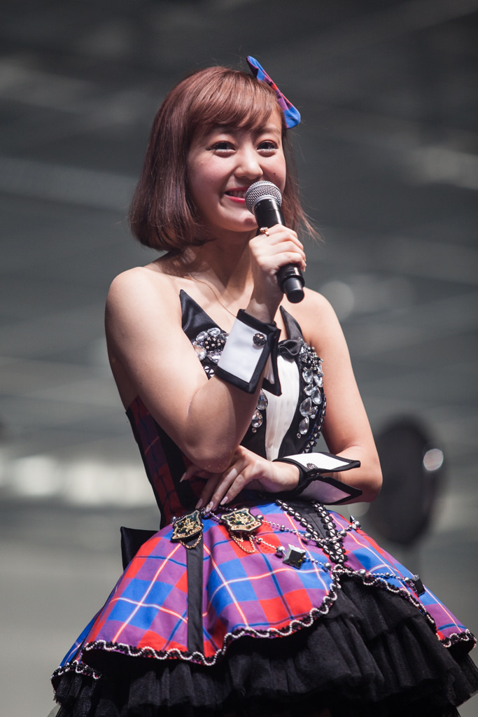 Berryz Kobo x °C-ute